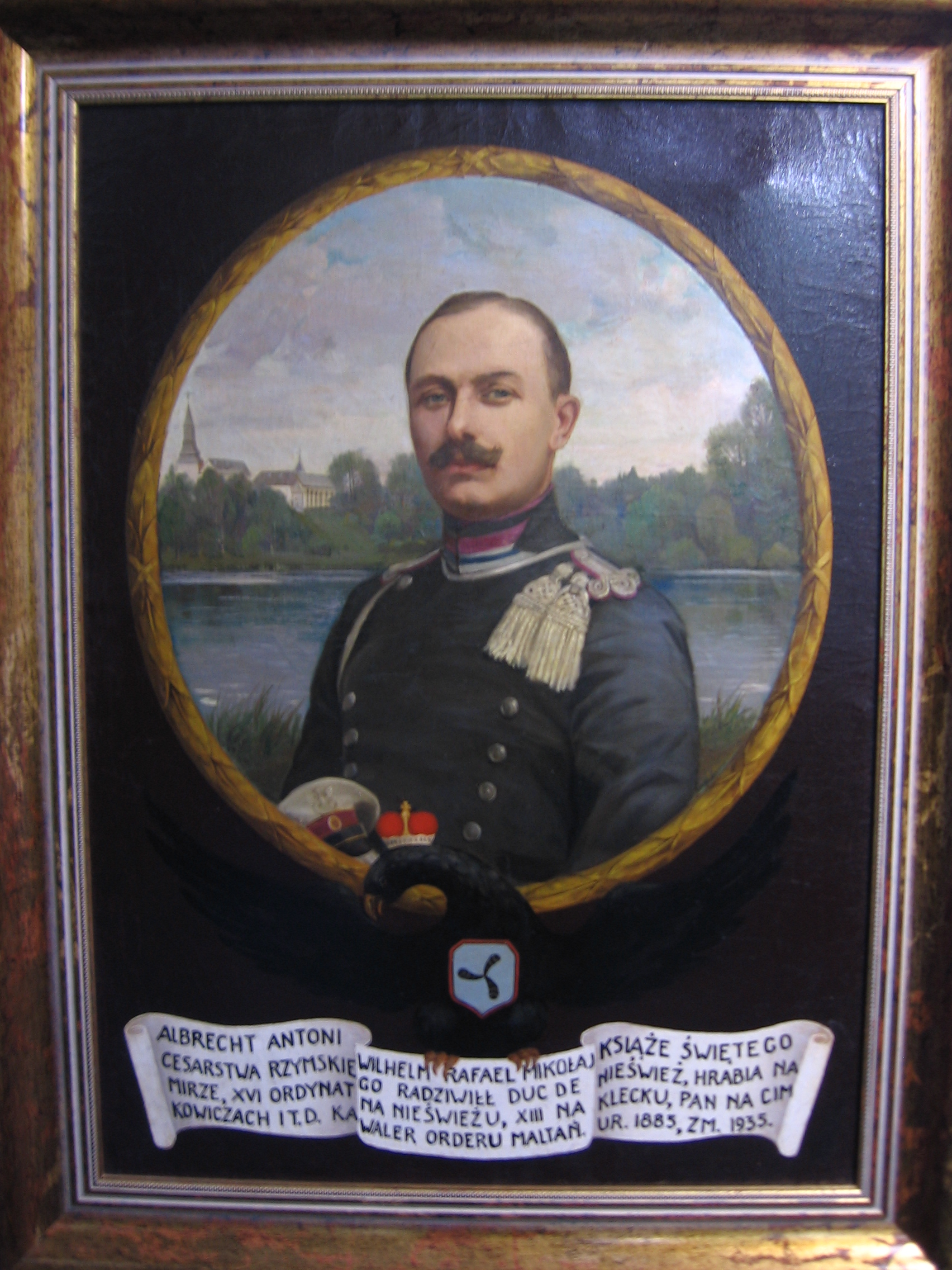 Альбрехт Антоний Радзивилл (1885-1935) (последний владелец несвижского замка до советской власти. Неизвестный художник, первая половина XX века. Холст, масло. Хранится в историческом музее РБ.